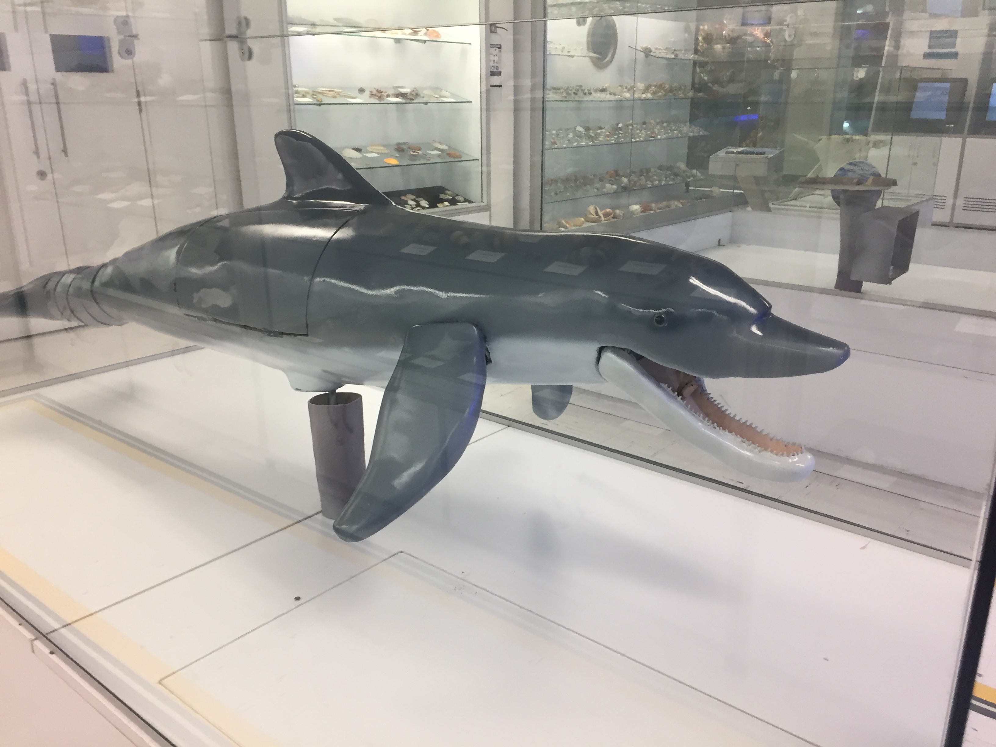 Este es uno de los tres animatronics que se encuentran en el museo del mar